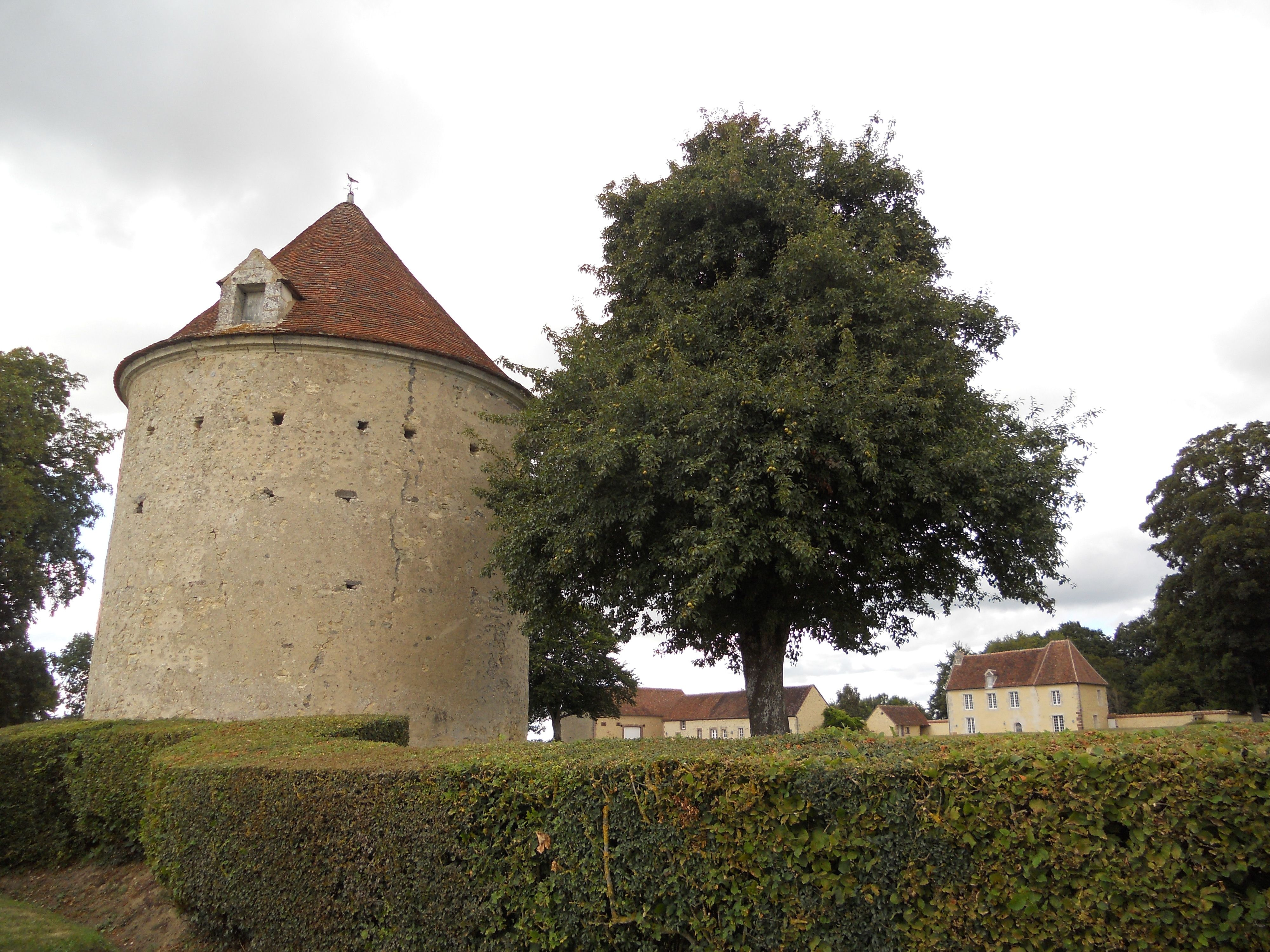 Le Plessis-Poix à Sainte-Céronne-les-Mortagne